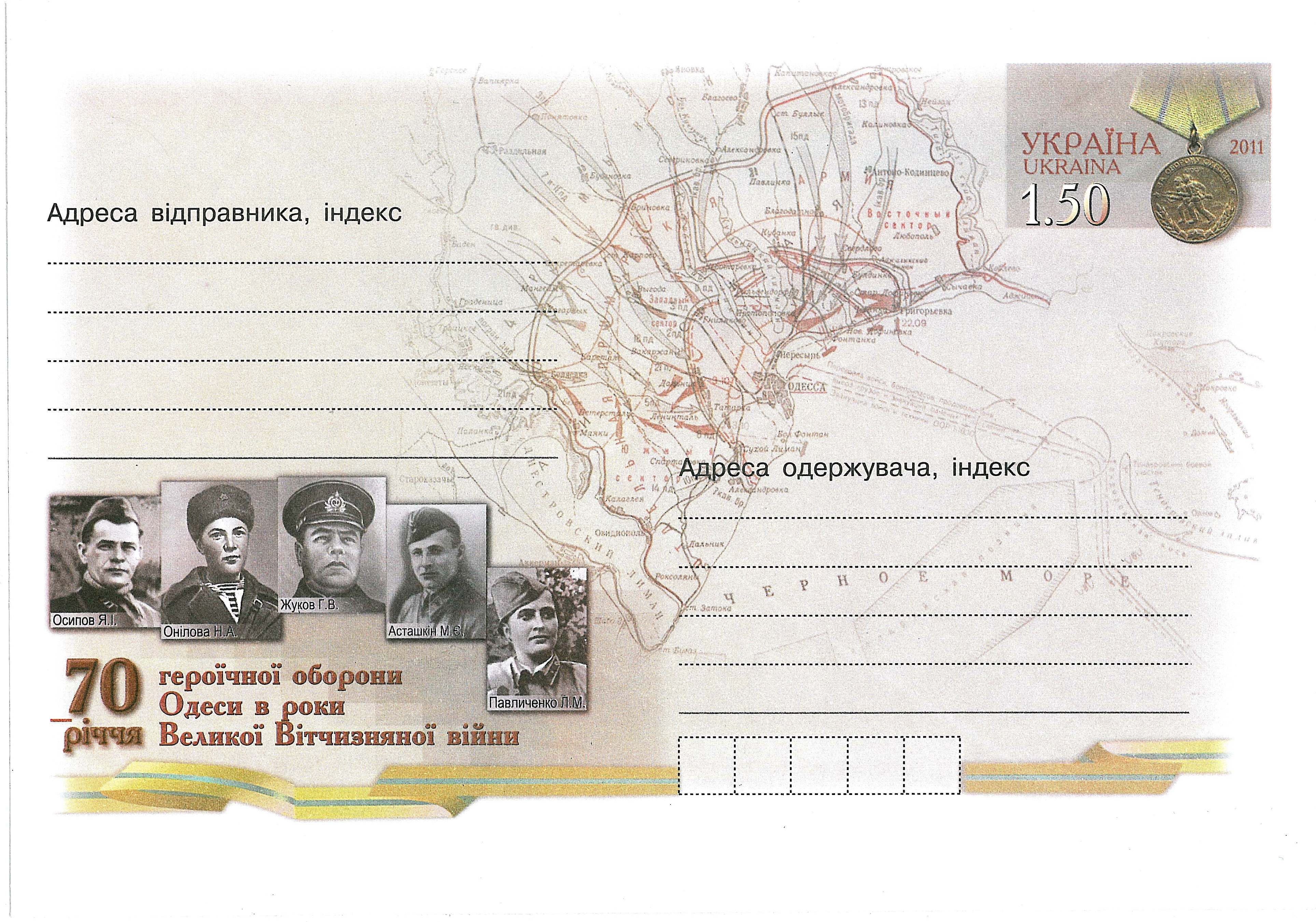 70 лет обороны Одессы (1941). Почтовый конверт с оригинальной почтовой маркой. Укрпочта, 2011. На марке изображена советская медаль "За оборону Одессы".